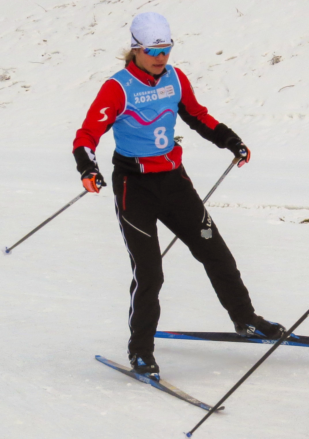 Lisa Hirner et Johanna Bassani à l’échauffement.